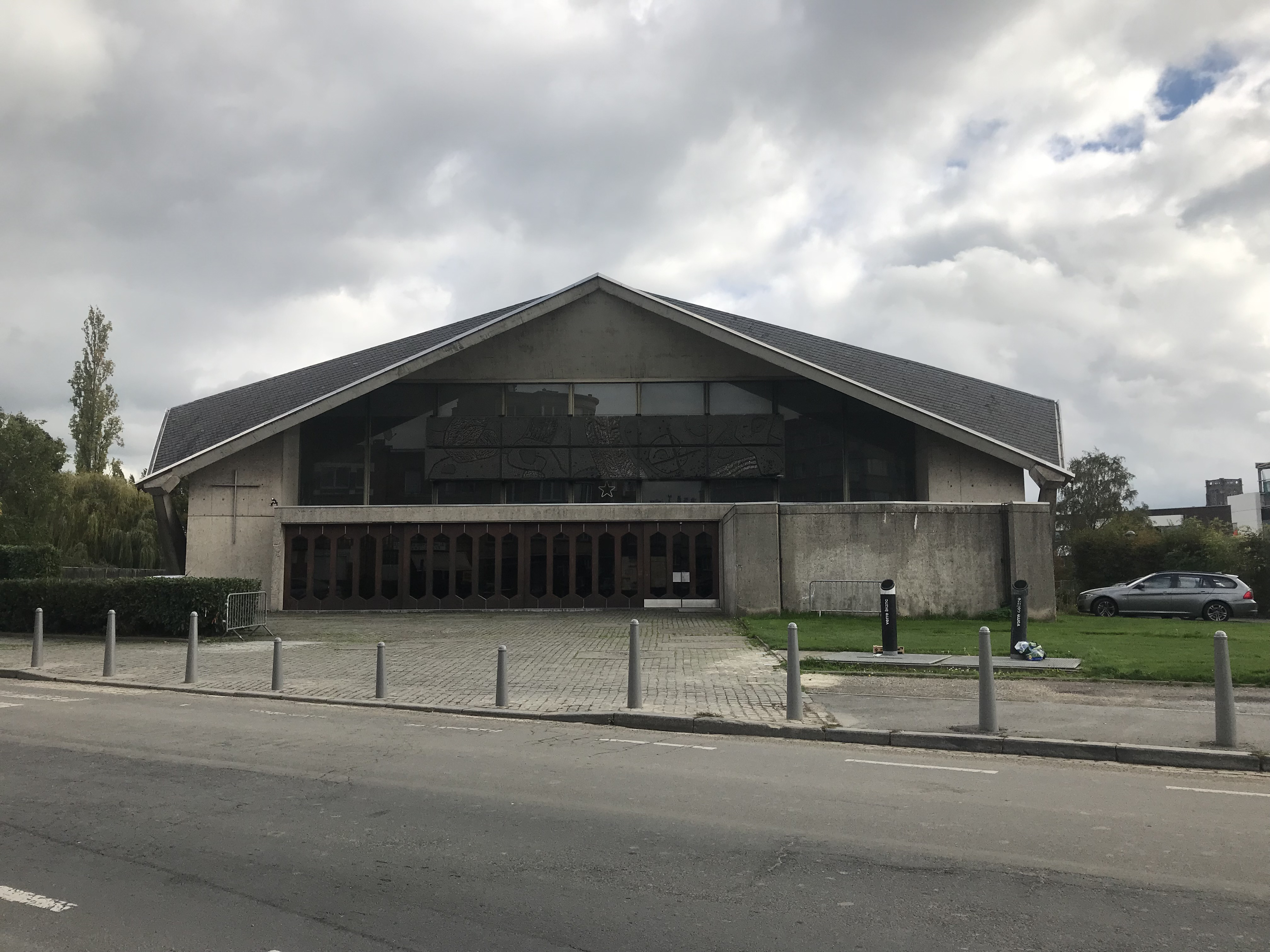 Eglise paroissiale Saints-Pierre-et-Paul à Droixhe, Liège